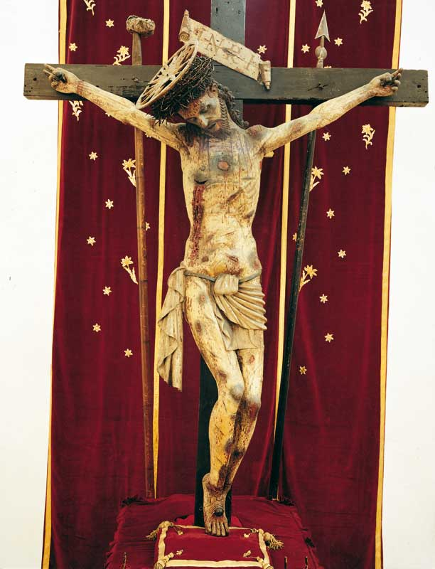 Miglionico - Crocifisso ligneo del 1629 realizzato dal Padre francescano Umile da Petralia 23:52, 13 nov 2008 (CET)